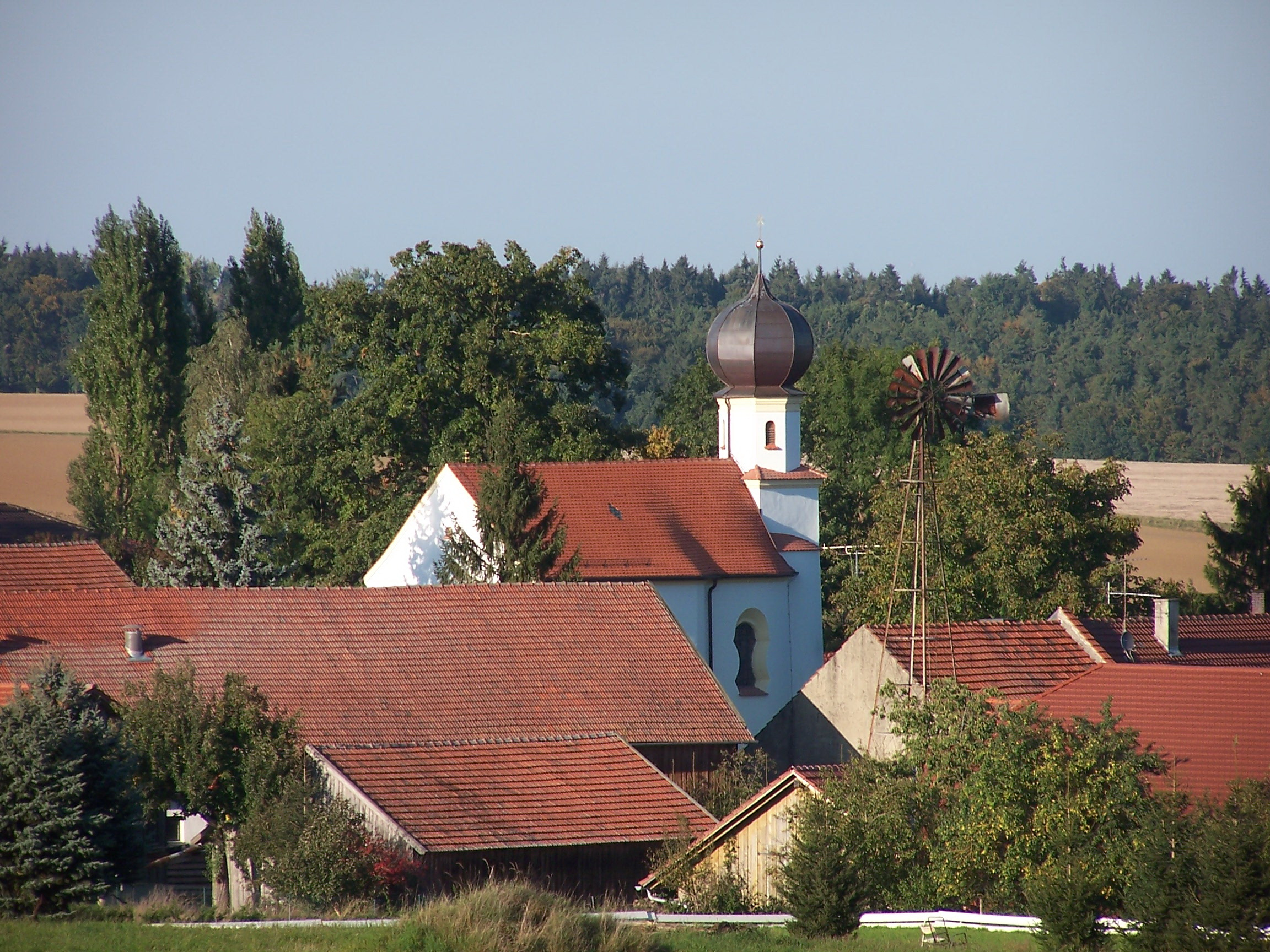 Bayerbach, Pram, Haus Nr. 9. Filialkirche St. Martin und Nikolaus. Saalkirche, von 1758, Apsis romanisch, mit kleinem Turm über der Apsis, mit Achteckaufsatz und Zwiebelkuppel; mit Ausstattung. Ortsmitte mit Kirche und Windrad.